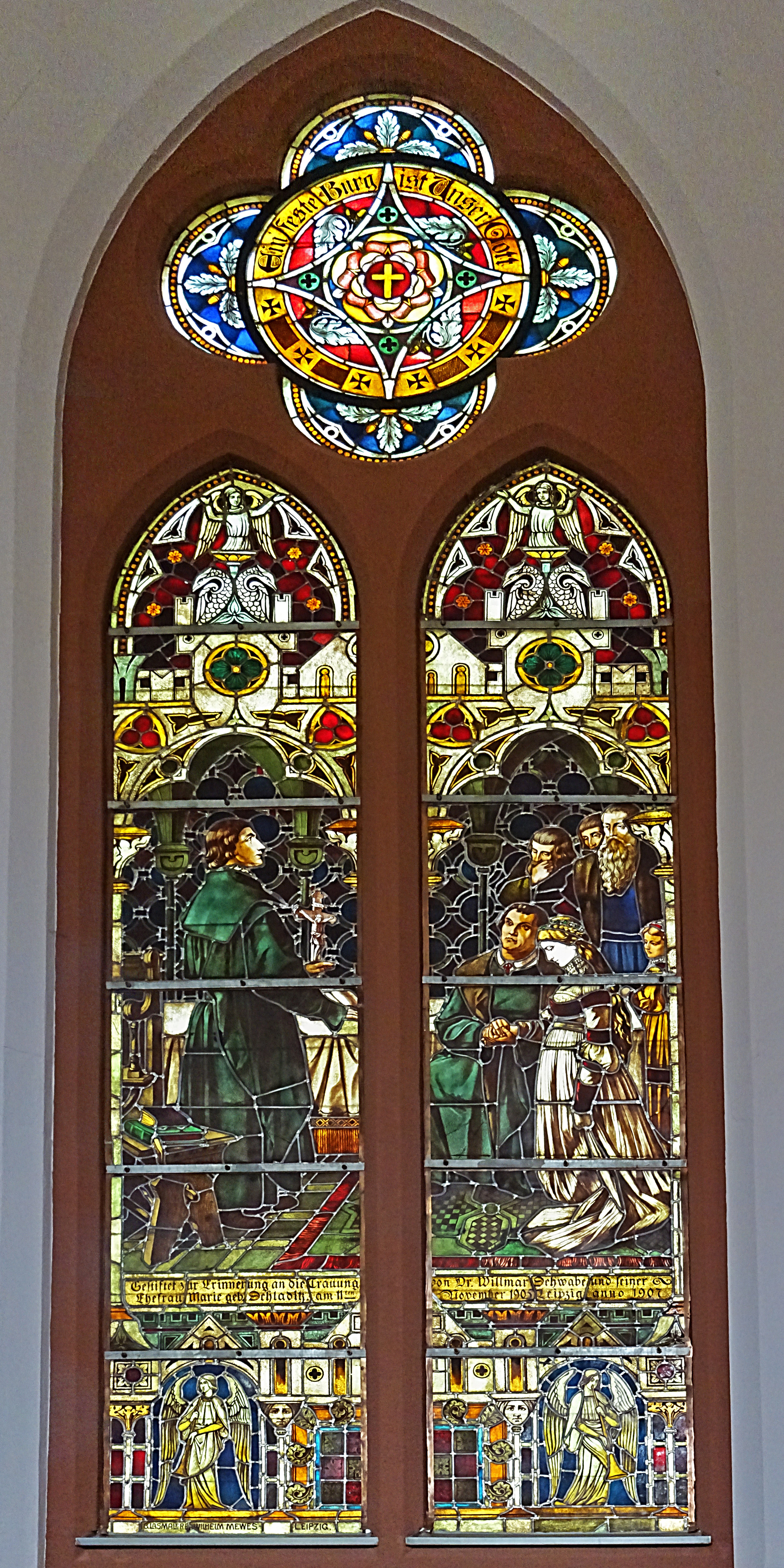 Luthertrauung, Buntglasfenster von Wilhelm Mezees in der Georg-Marienkirche Ilfeld